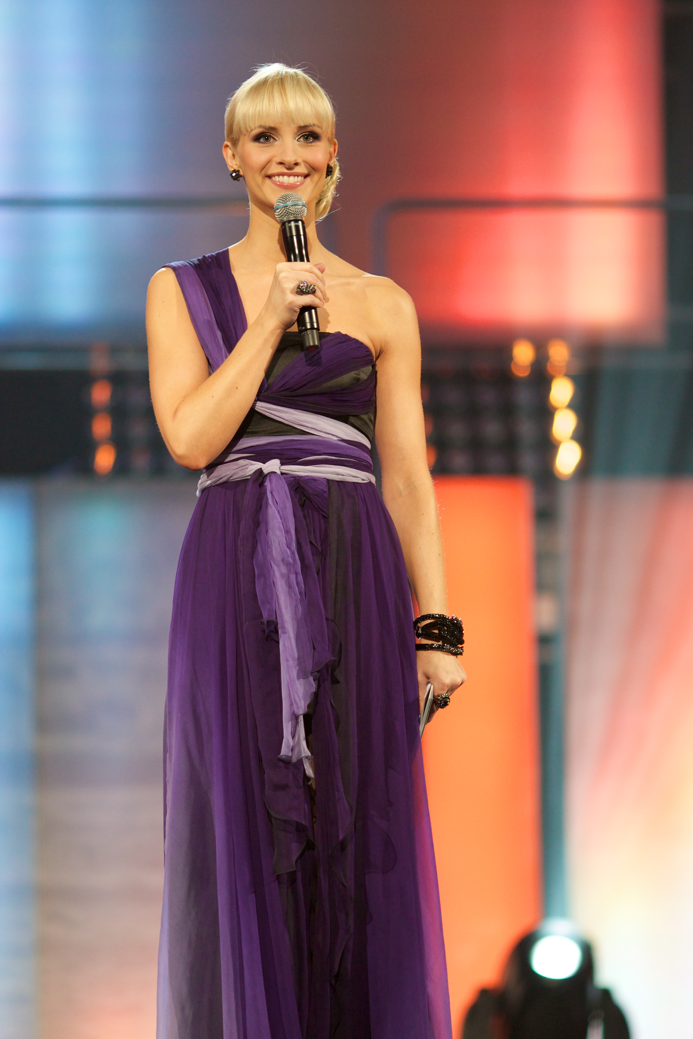 Programleder MGP Skien 2011